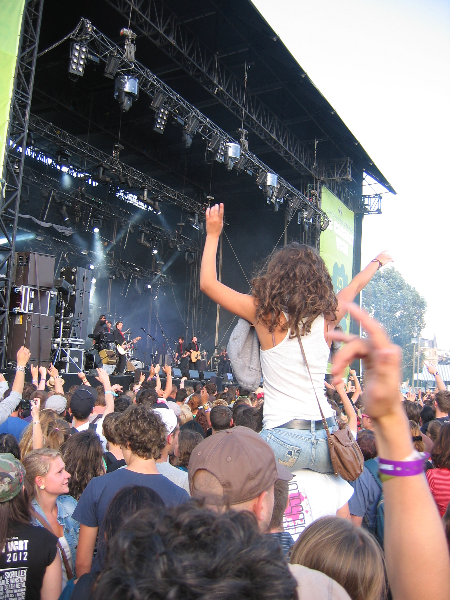 Le public